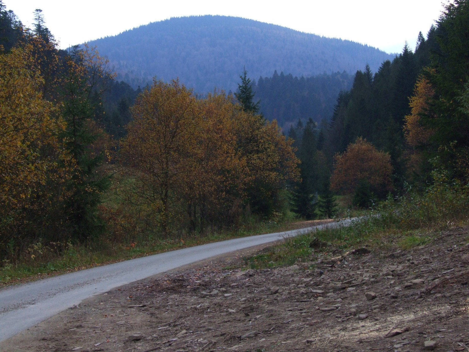 Mostownica i dolina potoku Konina. Widok z Potaszni w Koninie